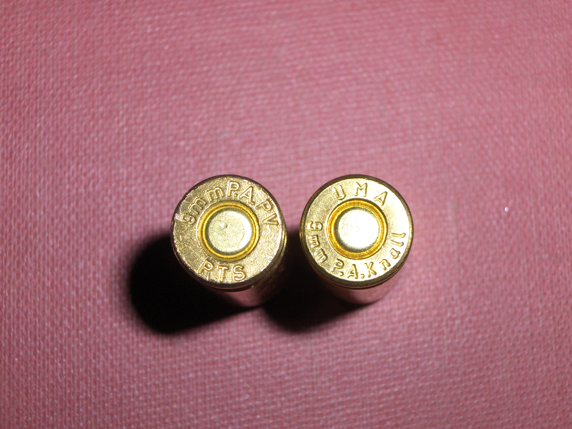 9mm PAK töltény alja a vésetekkel